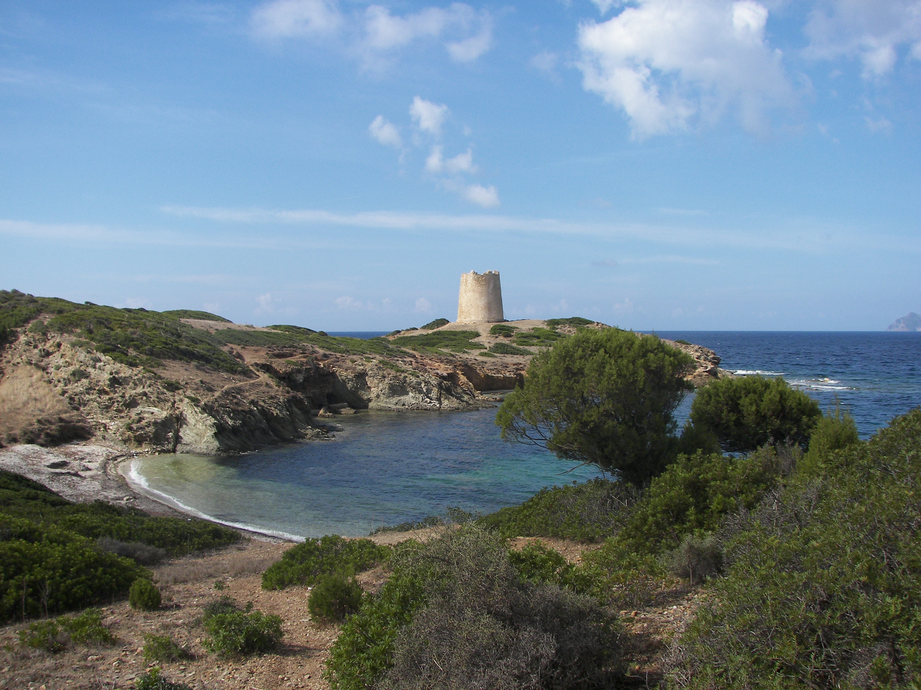 Torre saracena - Costa di Teulada (CA)